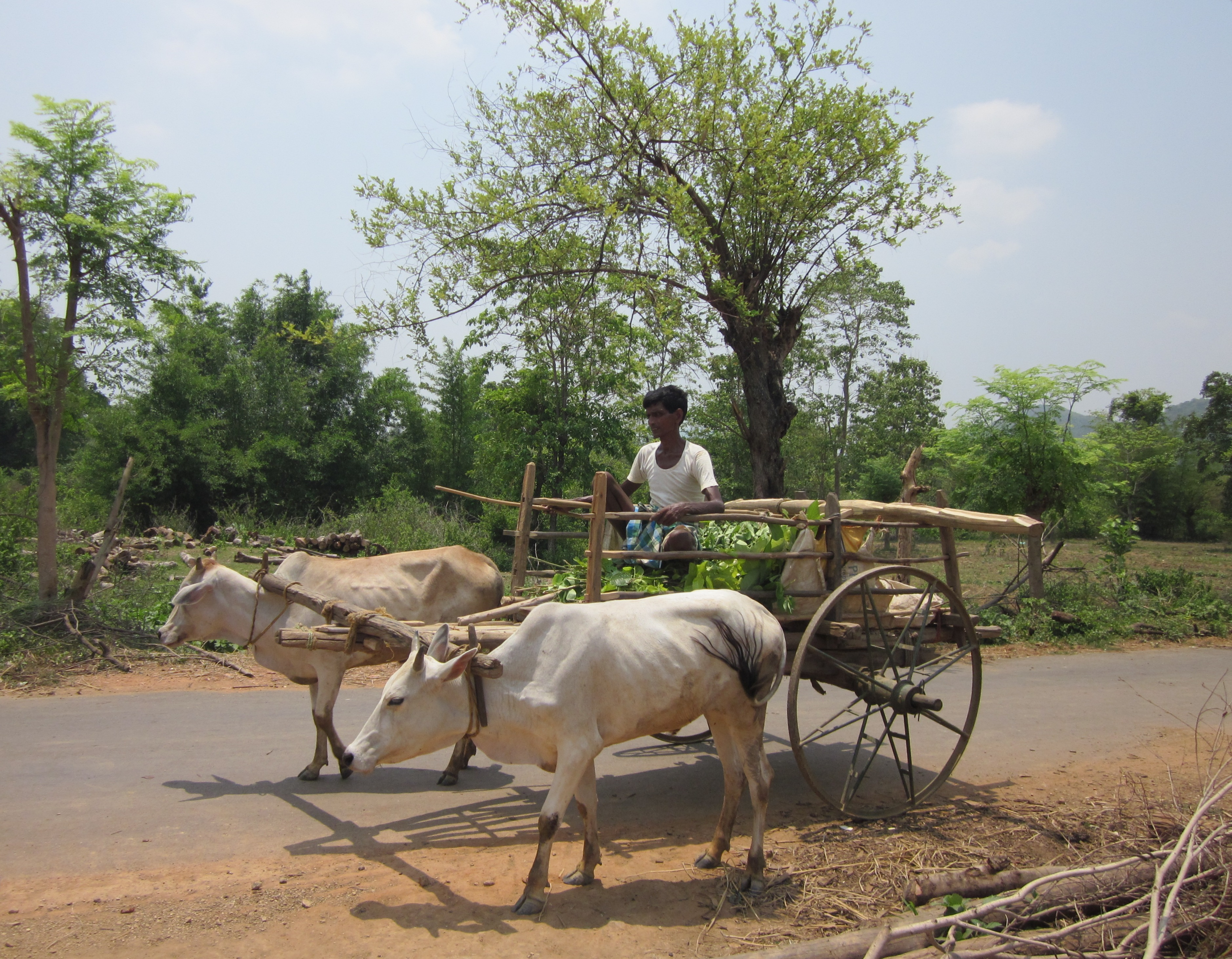 গরুর গাড়ী